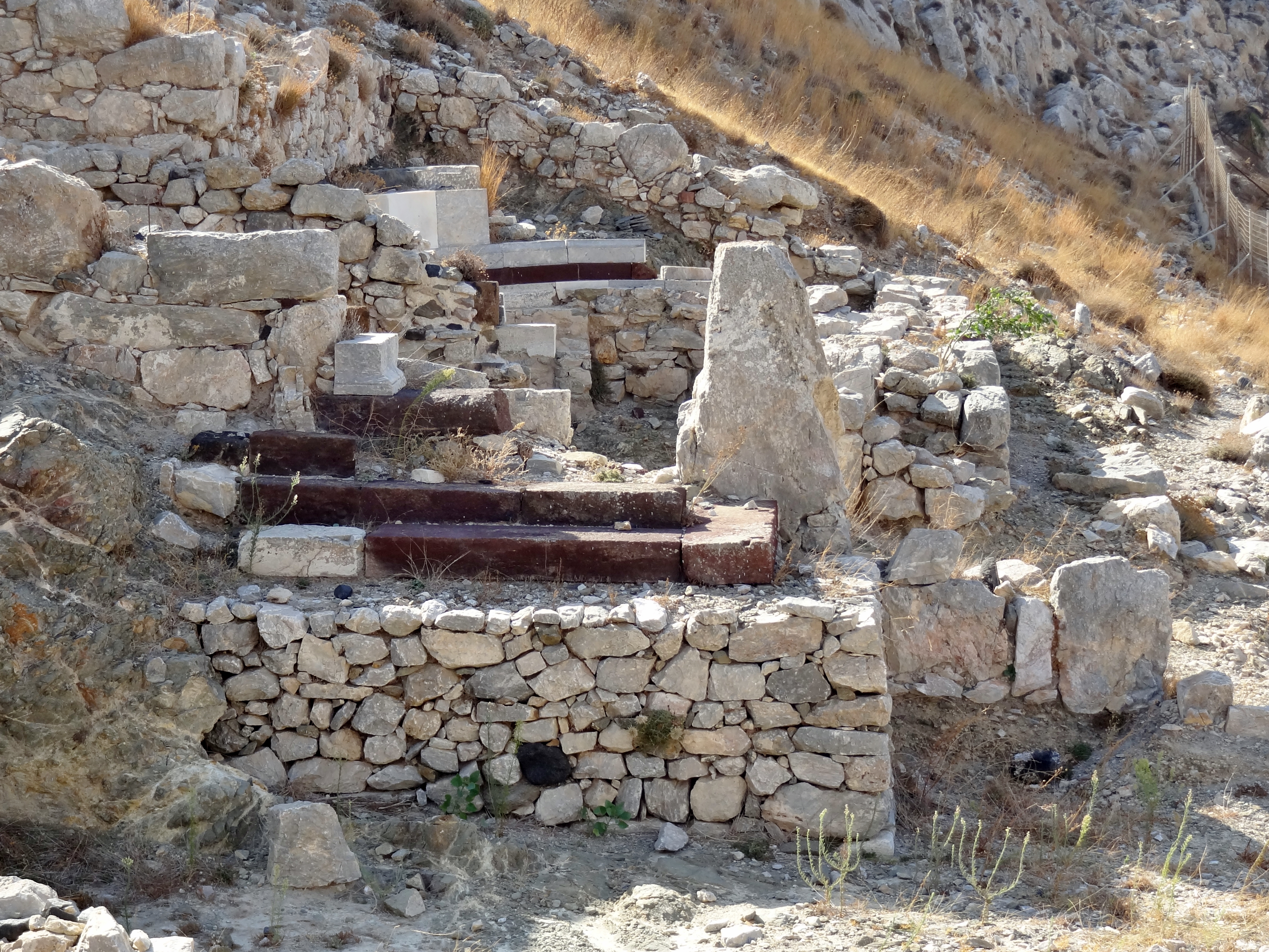 Heiligtum der Aphrodite in Alt-Thera, Santorin, Kykladen, Griechenland